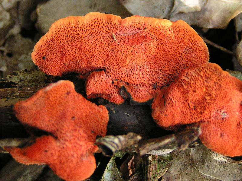 Pycnoporus cinnabarinus - Polyporaceae